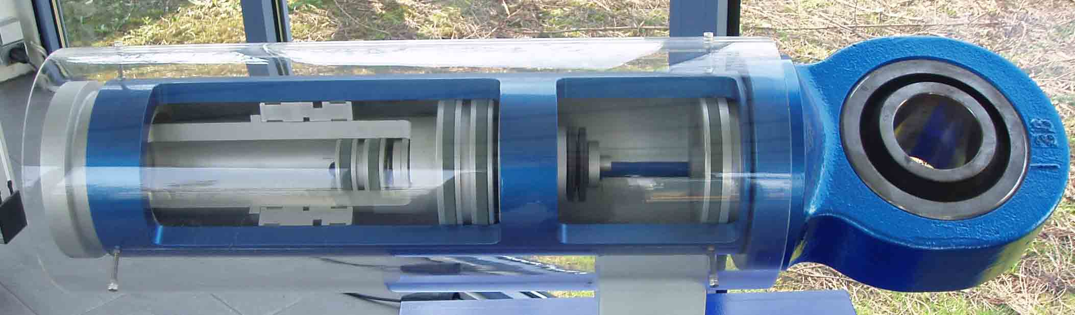 Ein Modell des TwinStrokes